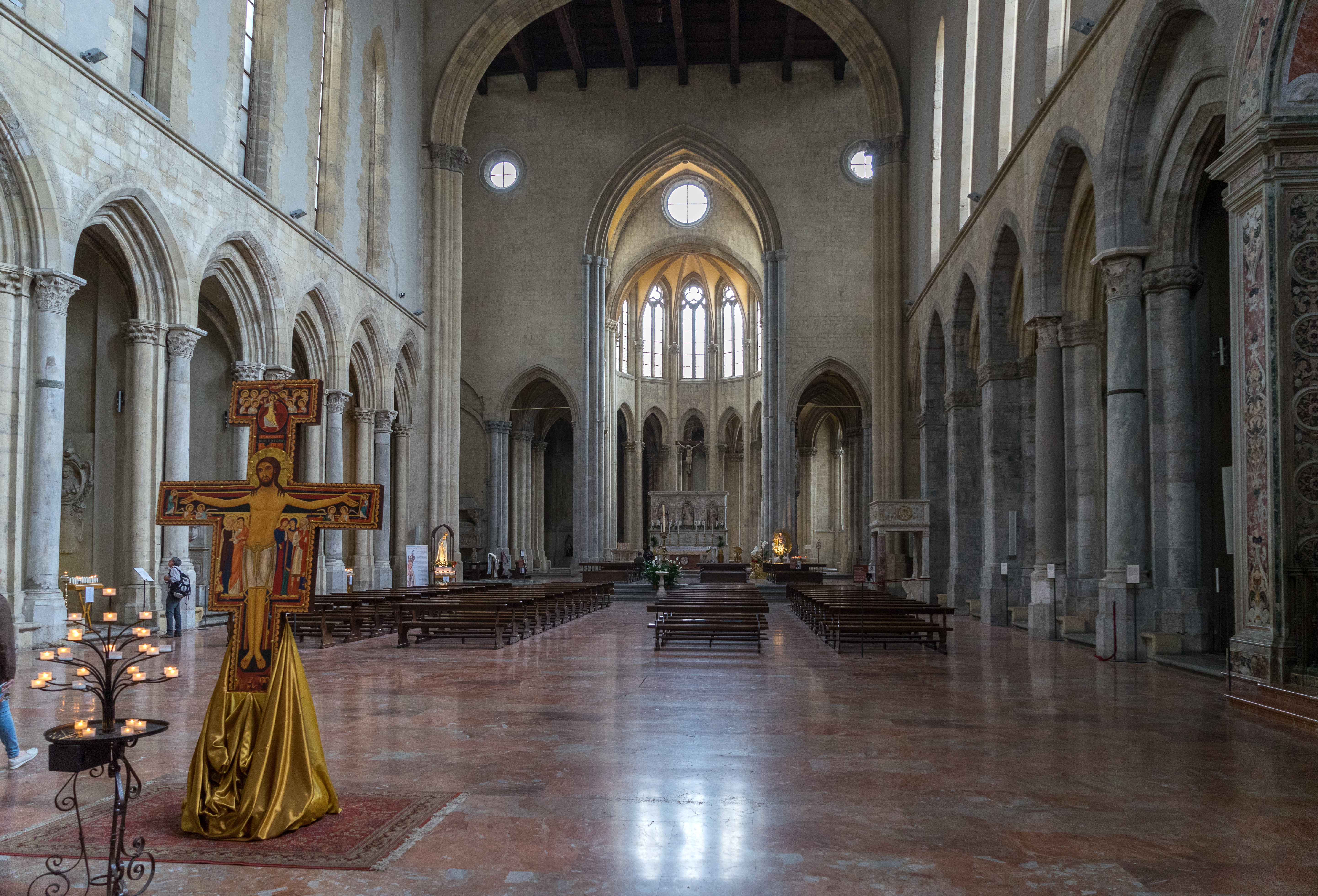 Naples - San Lorenzo Maggiore - Nef